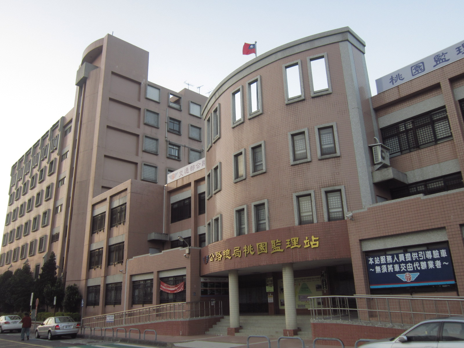 交通部公路總局新竹區監理所桃園監理站。